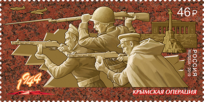 Путь к Победе. Крымская операция.